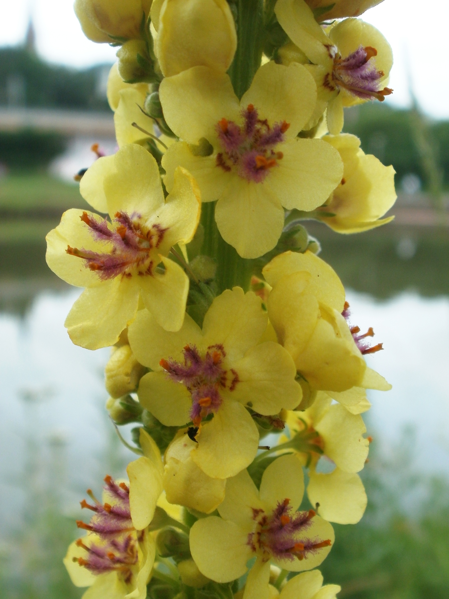 Schwarze Königskerze am Staden (Saarbrücken)